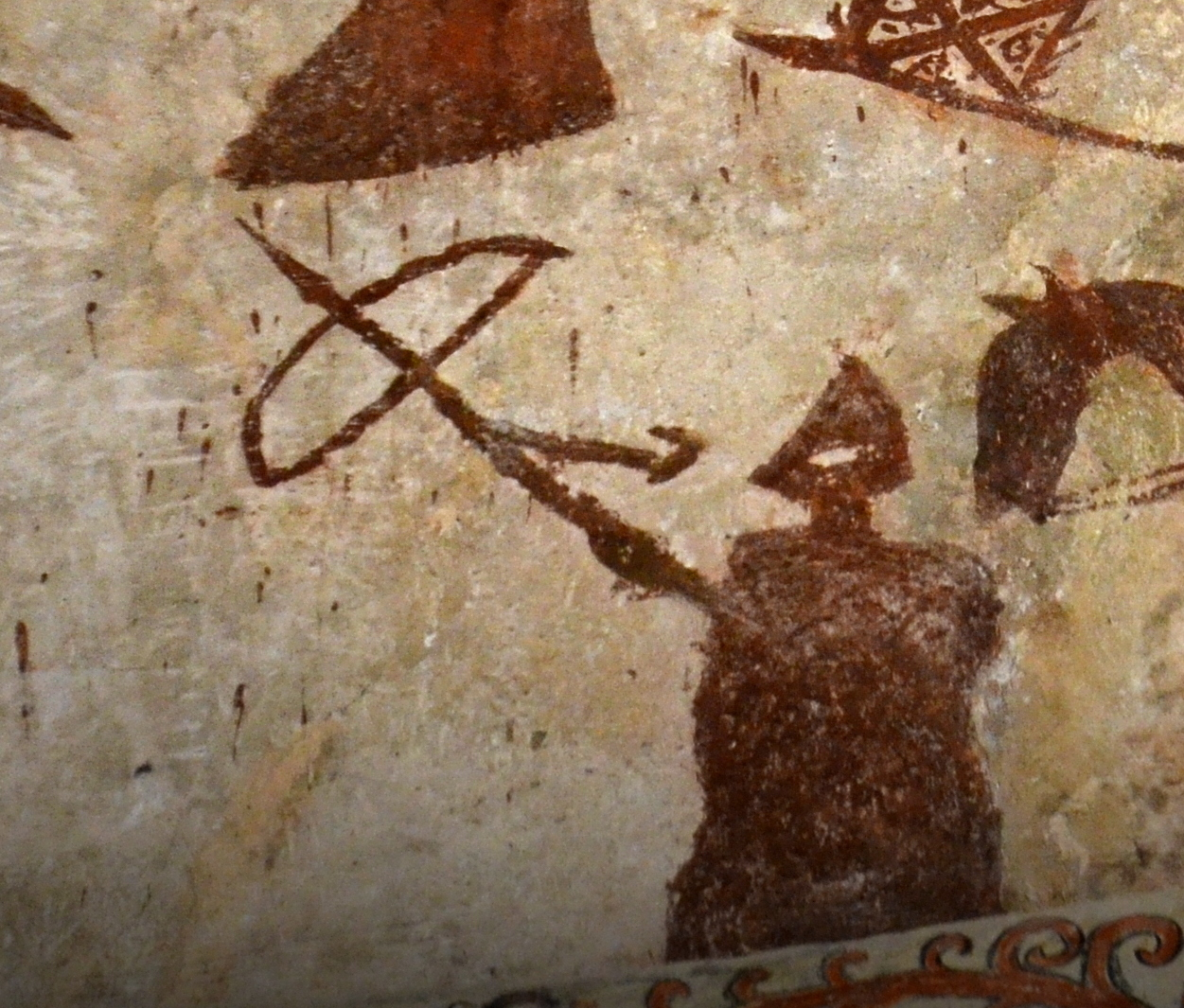 Alaitzako eliza erromanikoa, bere margolan ikusgarri bezain bereziekin.